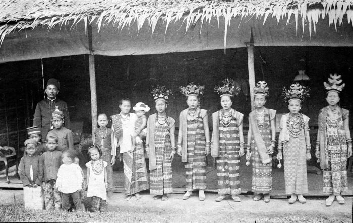 Repronegatief. Dansmeisjes van Lampong te Menggala